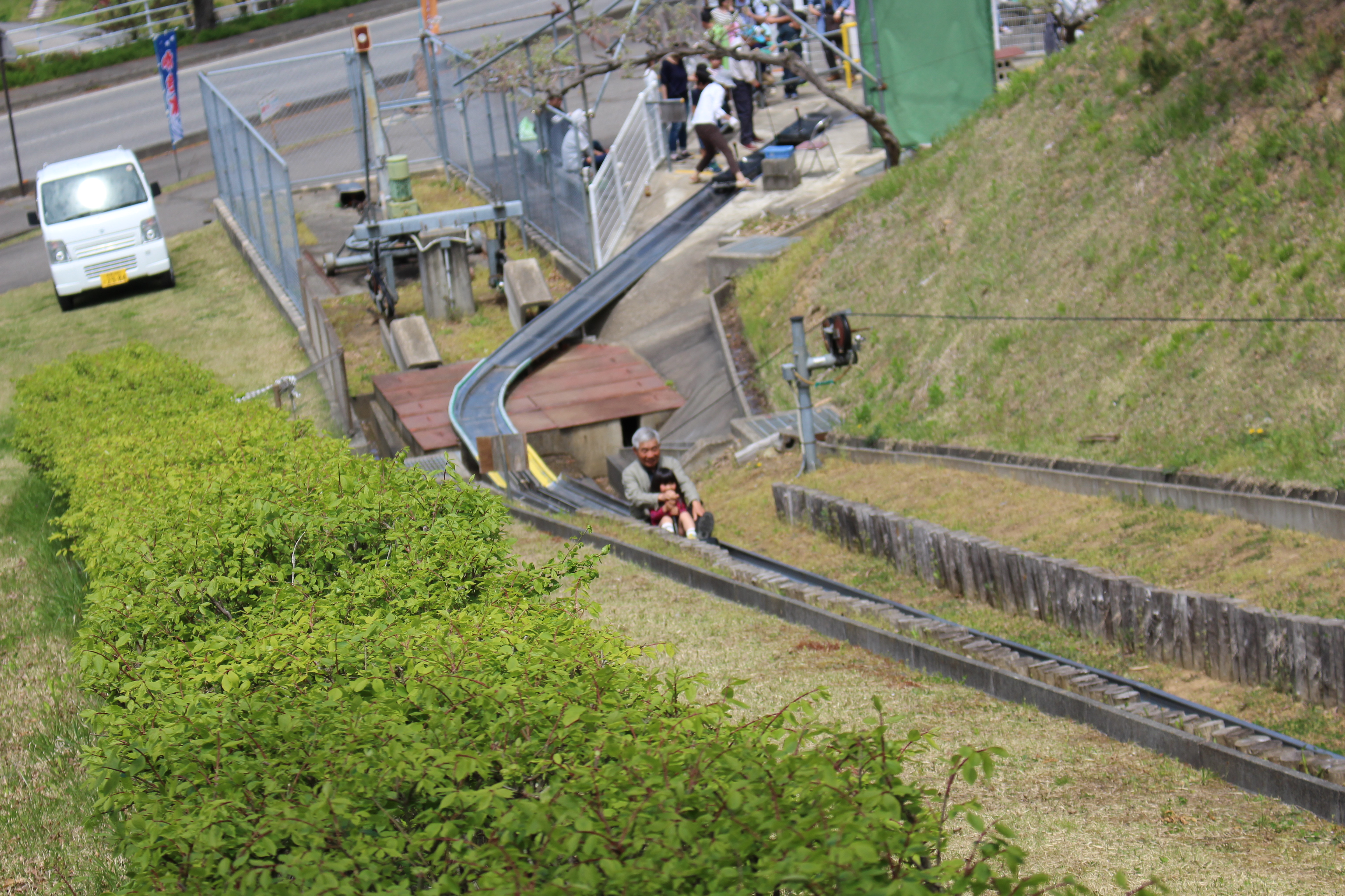 北信濃ふるさとの森文化公園サマーボブスレー